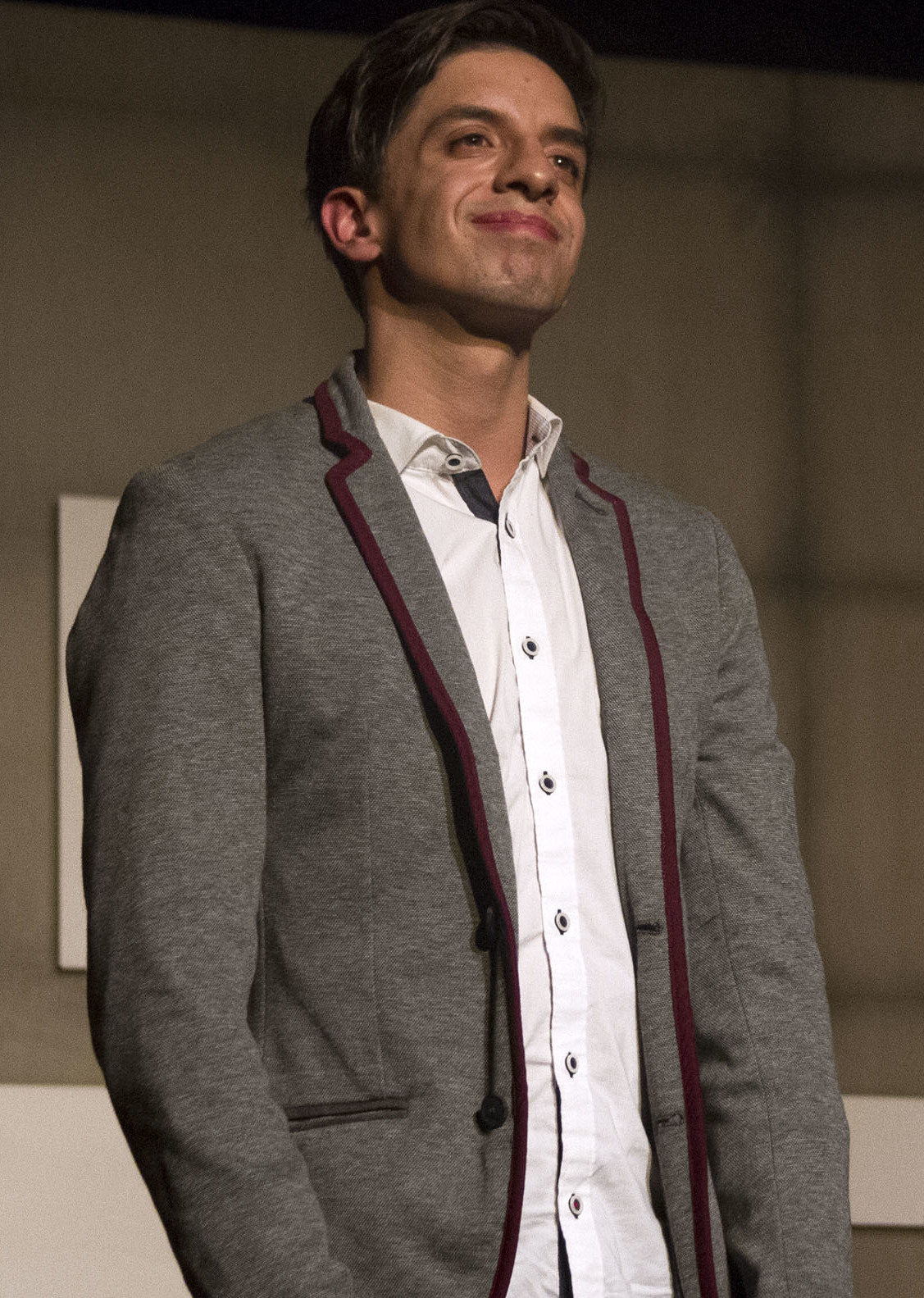 Martes 22 de Septiembre 2015. En el Teatro Benito Juárez, se estreno la temporada de la puesta en escena El chico de la última fila del dramaturgo español Juan Mayorga, bajo la dirección de José María Mantilla.El reparto está integrado por: Anna Ciocchetti, Carlos Corona, Luis Miguel Lombana, Paloma Woolrich, Jorge Caballero y Mauro Sánchez Navarro.